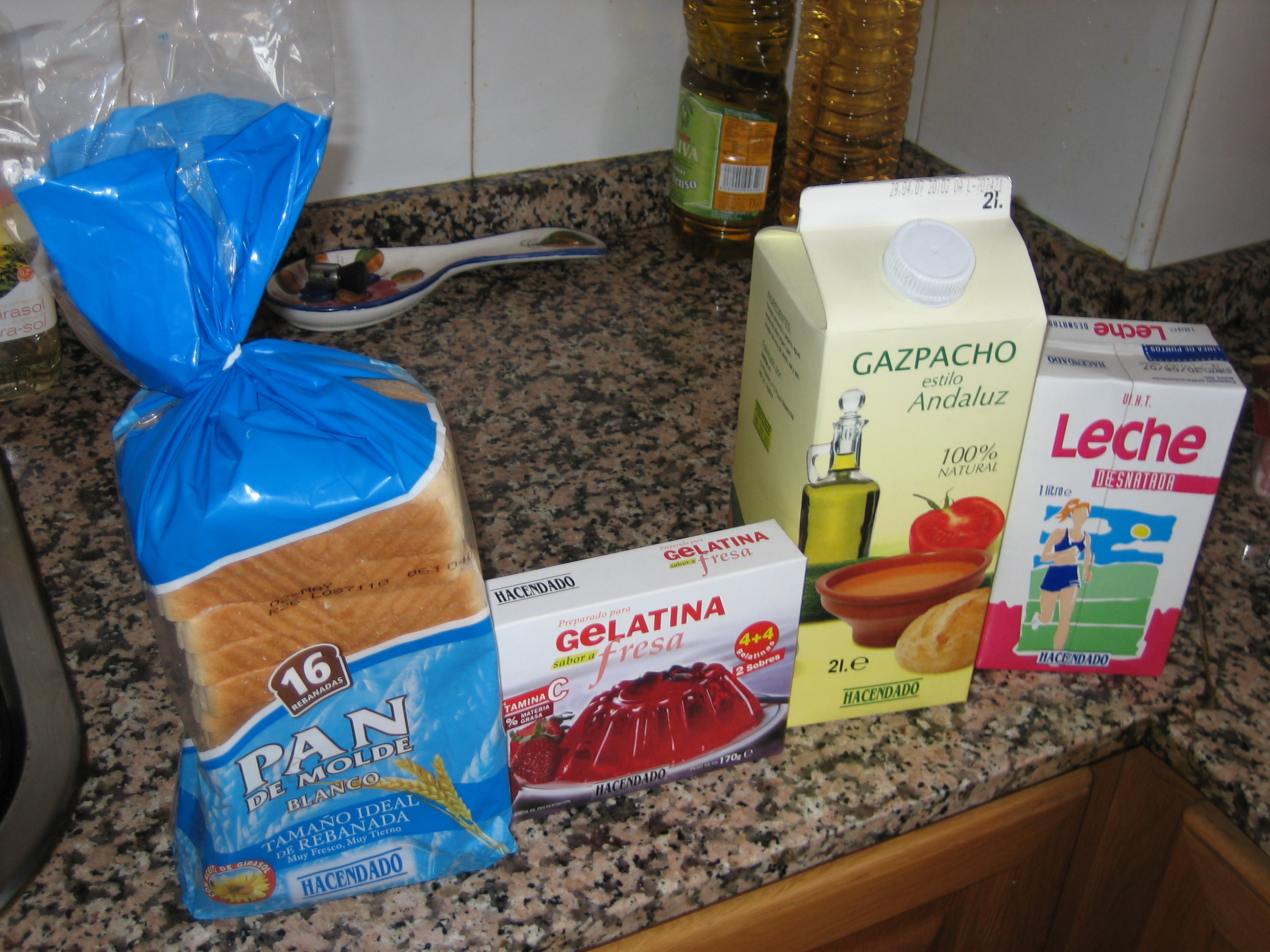 And I love Mercadona too!